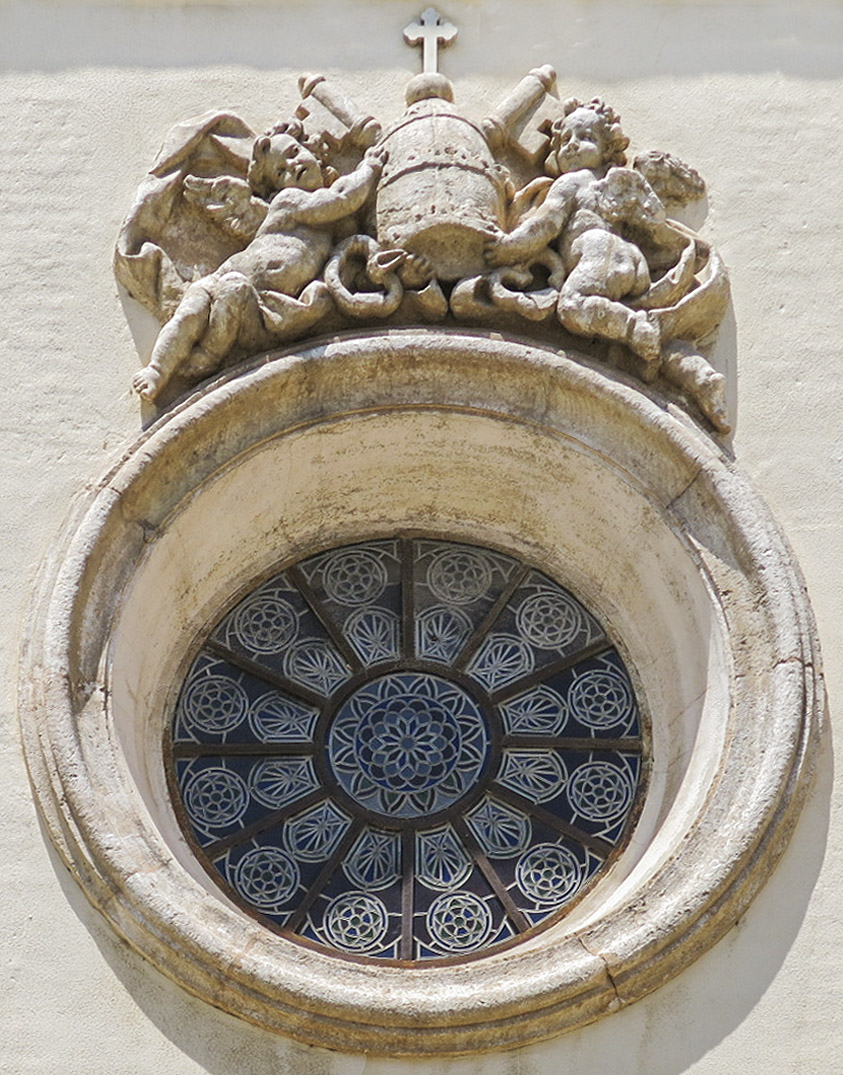 L'església de Sant Pere està situada a la plaça major de Benifaió, poble de la Ribera Alta del País Valencià.